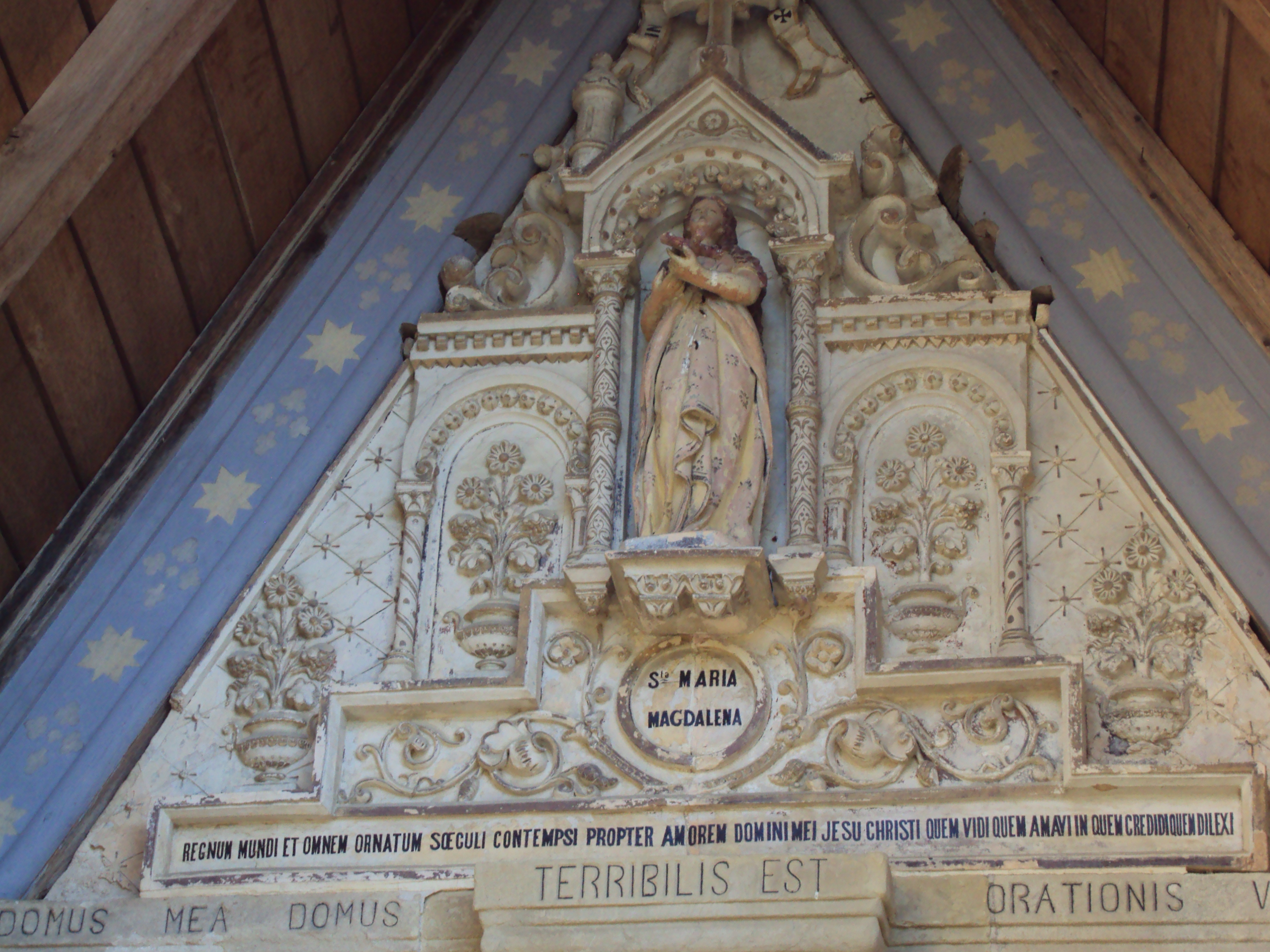 Fachada de la iglesia de Renne le Chateau en la que se anuncia que el lugar es terrible.